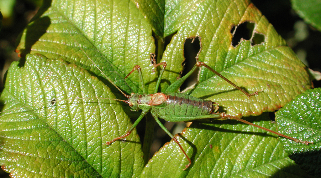 Leptophyes punctatissima, m., Punktierte Zartschrecke, Männchen, Elbmarsch bei Hamburg, Deutschland